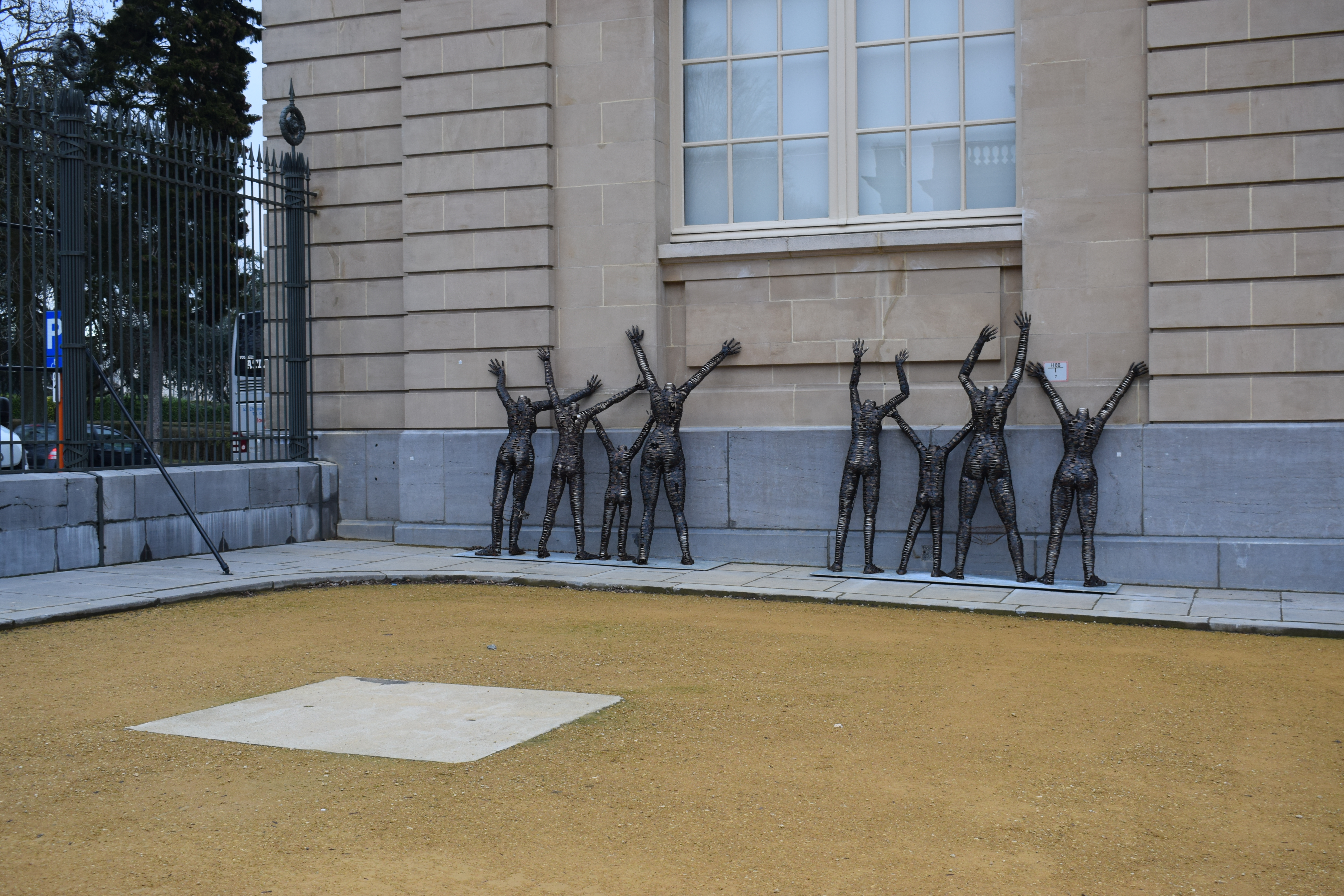 Vue de l'Africa Museum à Tervueren (Belgique).